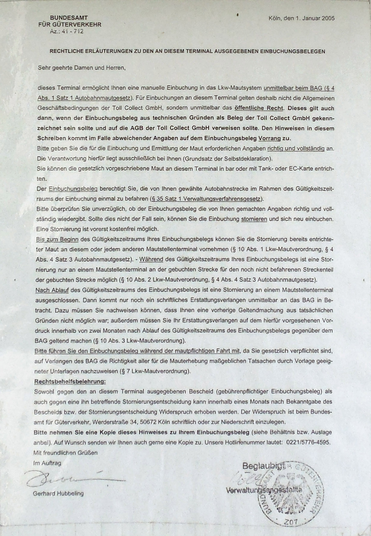 Toll Collect Maut Terminal vor dem BAG, Kleingedrucktes